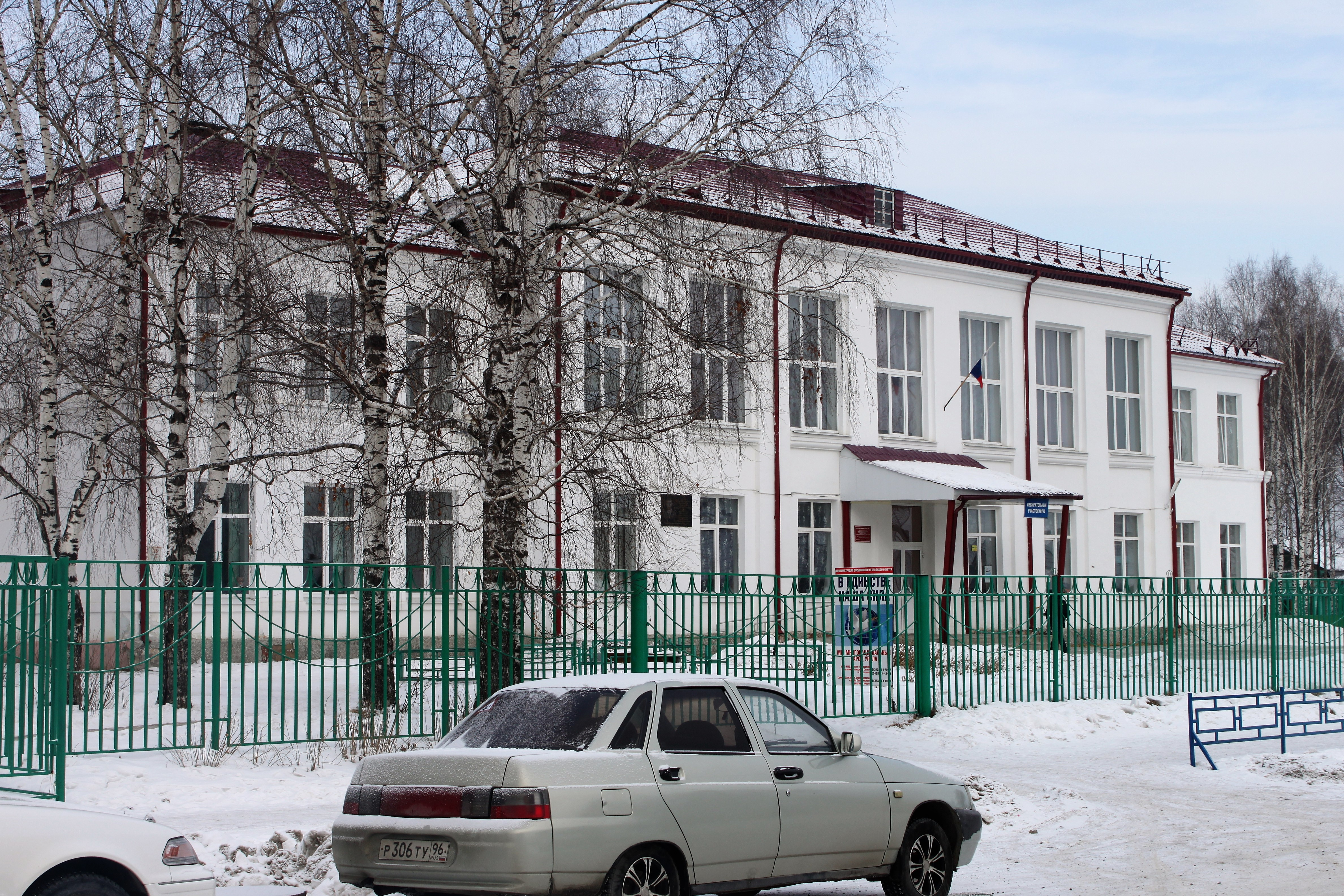 Школа № 1 имени Героя России В. В. Романова